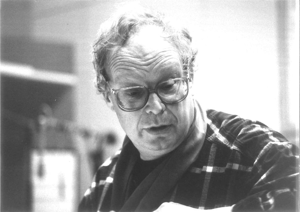 Der Hörspielregisseur Jörg Jannings in einer Porträtaufnahme des Berliner Fotografen Werner Bethsold